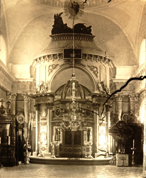 Храм Казанской иконы Божией Матери в селе Ярополец. Интерьер Казанской церкви. Иконостас. Фото нач. ХХ в.